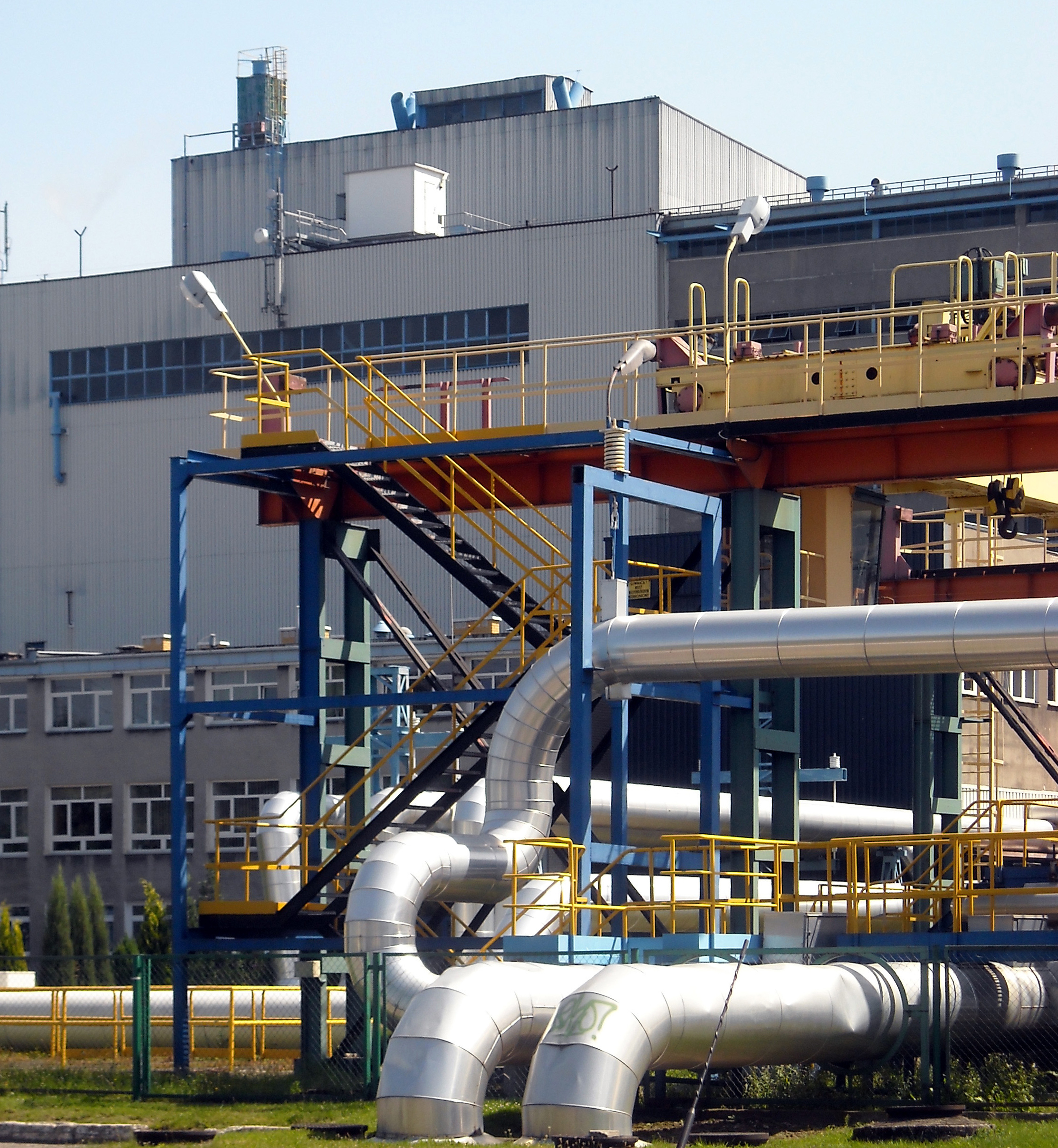 Elektrociepłownia Lublin-Wrotków przy ul. Inżynierskiej w lubelskiej dzielnicy Wrotków (wersja bez komina)